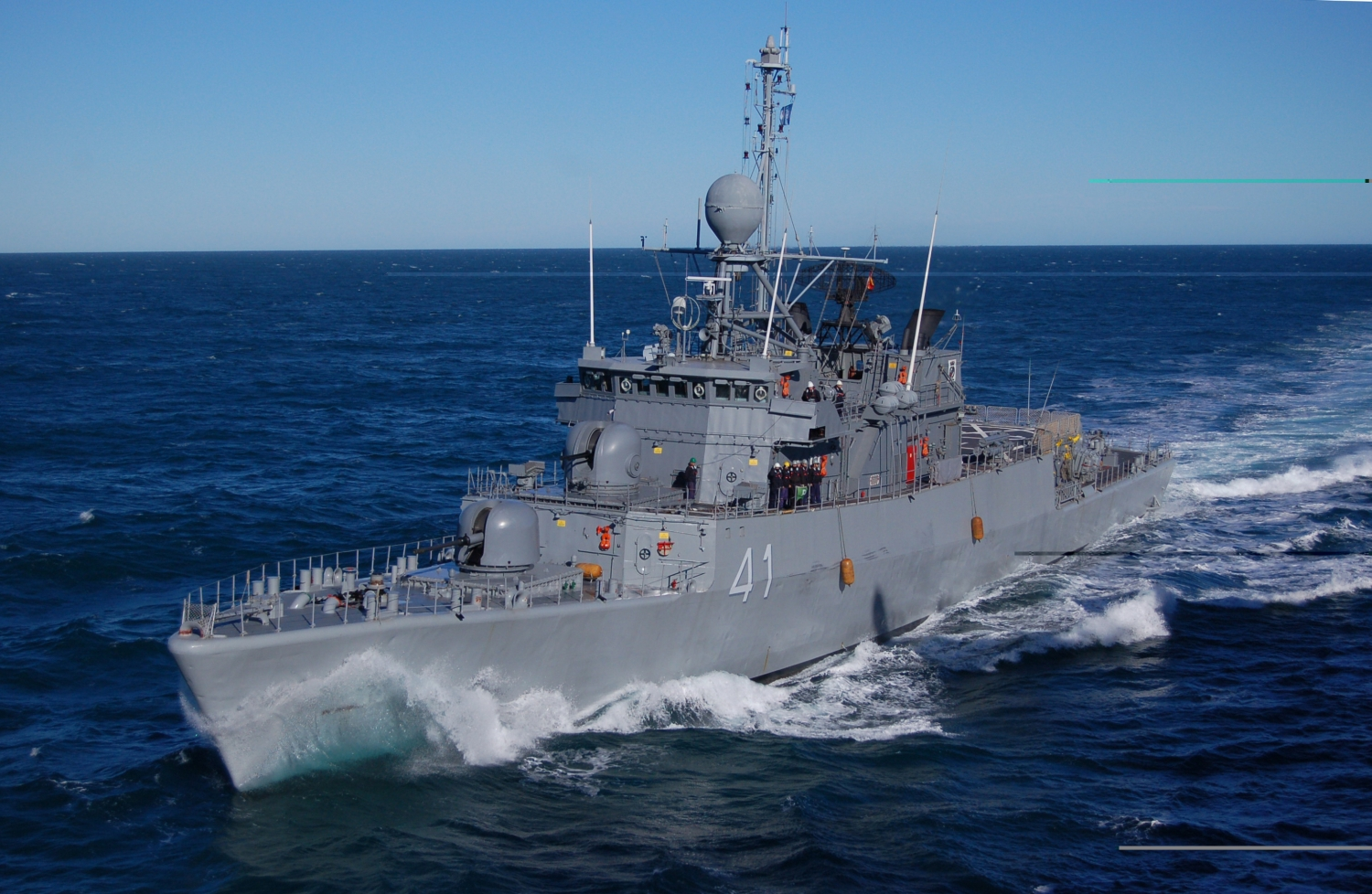 Espora P41 corvette